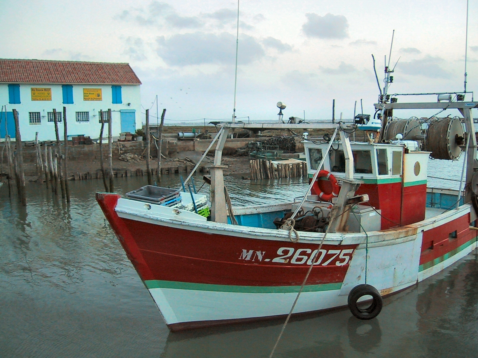 Marennes. Port de la Cayenne. Sunset. Charente-Maritime (17), France